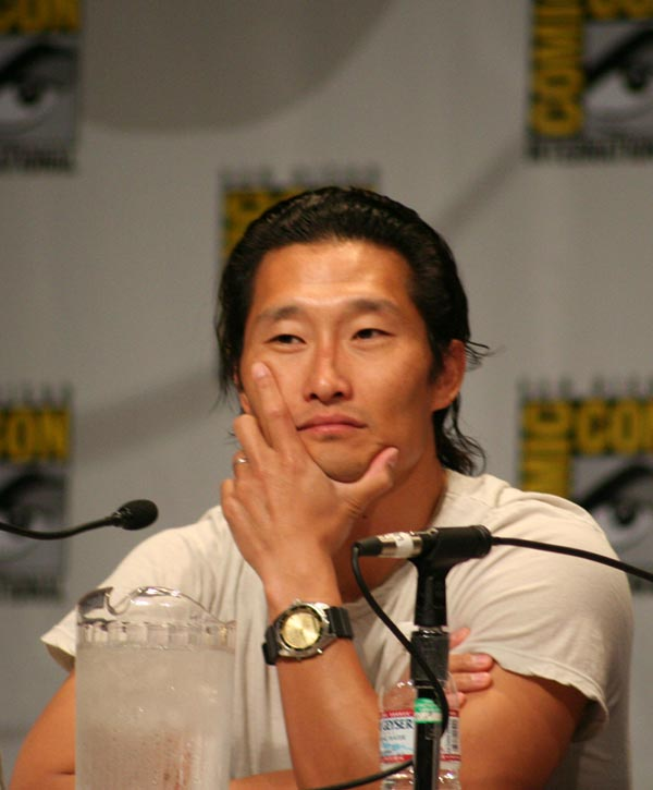 Daniel Dae Kim